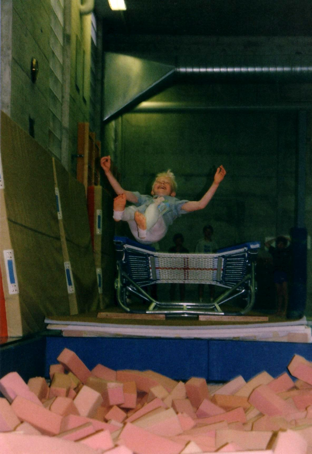 Illustration de l'utilisation d'une fosse à mousse lors d'un entraînement au mini-trampoline.